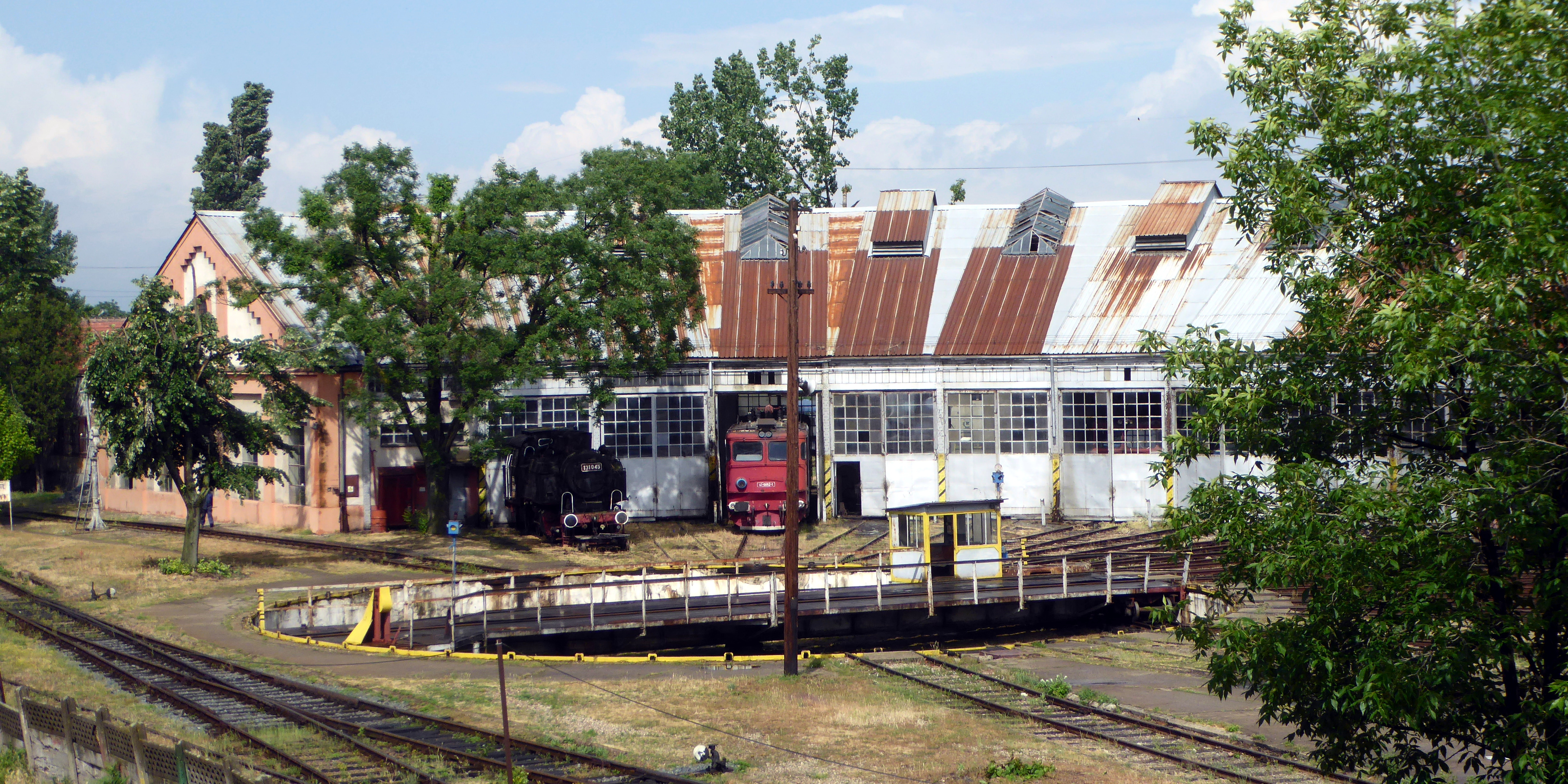 Temeswar (RO), Nordbahnhof, westlicher Lokschuppen mit Drehscheibe.